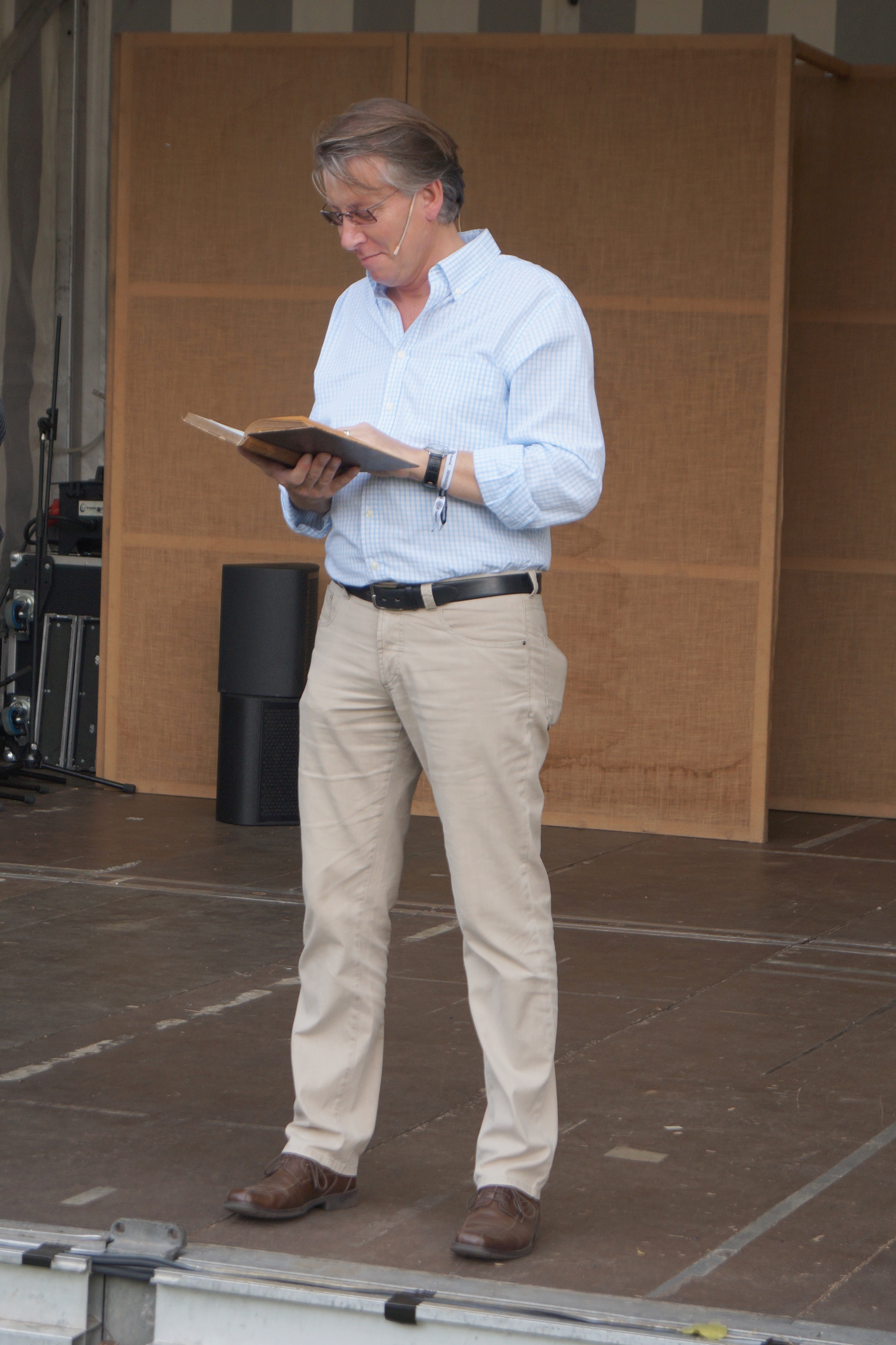 Martin Hoppe, Fachbereichsleiter Kultur der Stadt Hanau und Vorsitzender des Hanauer Geschichtsvereins 1844 e.V. bei einer Lesung auf dem Hanauer Bürgerfest.